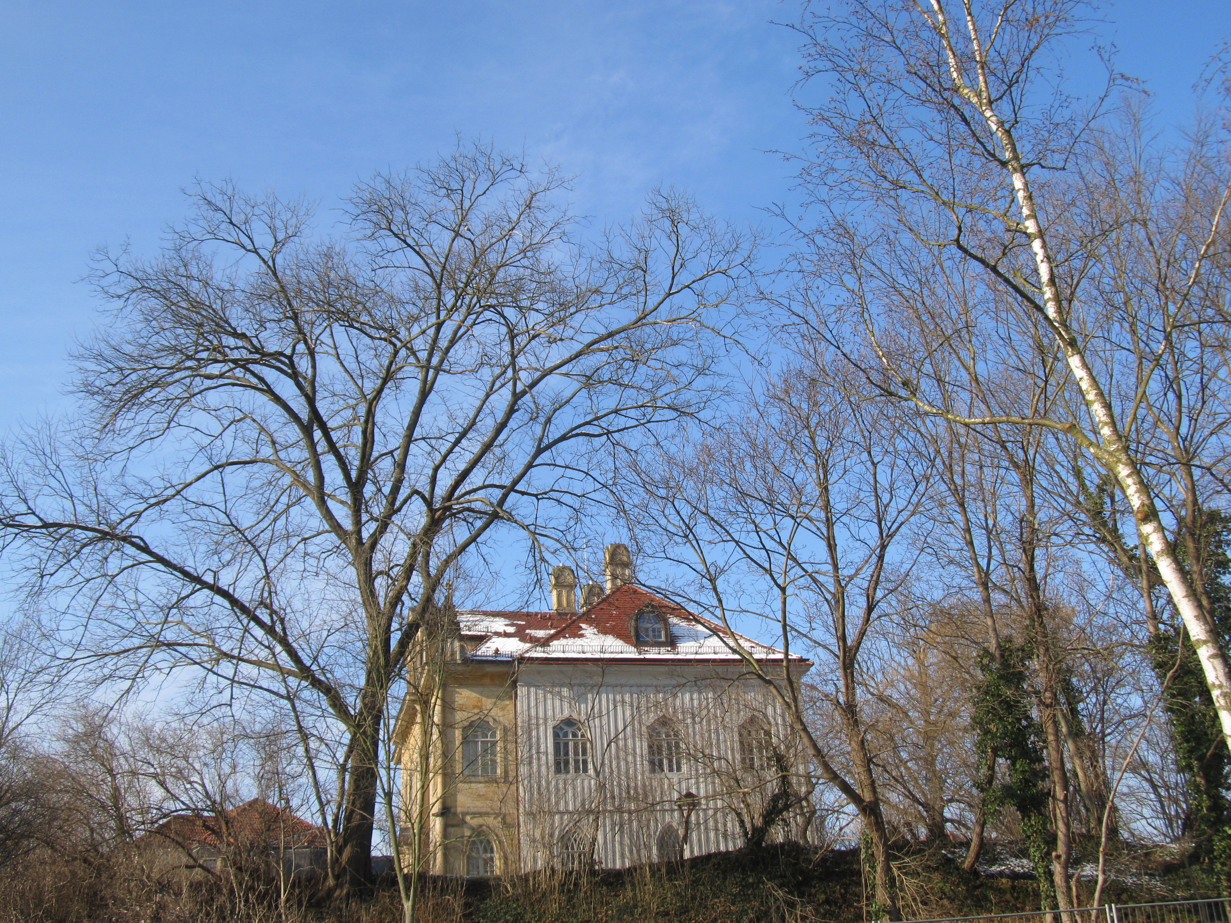 Waldschlösschen in Dresden Anfang 2018, Blick nach Westen auf die Ostfassade, nach der Sanierung